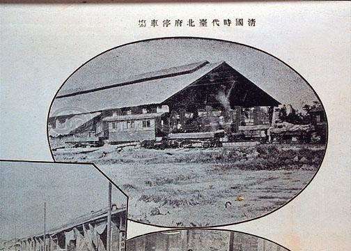 清代的台北車站，本建築於1908年拆除。